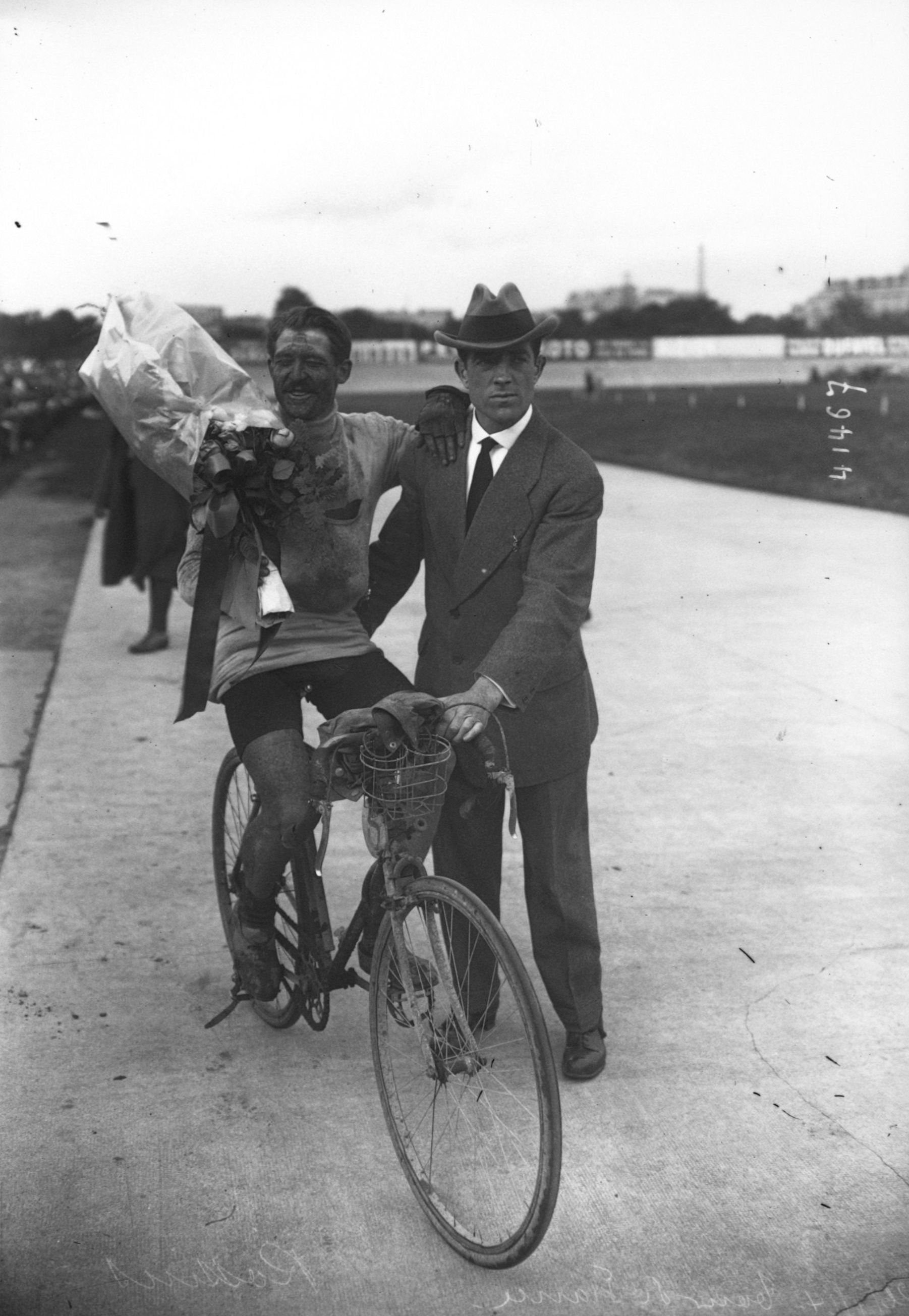 Jean Rossius à l'arrivée du Tour de France 1914